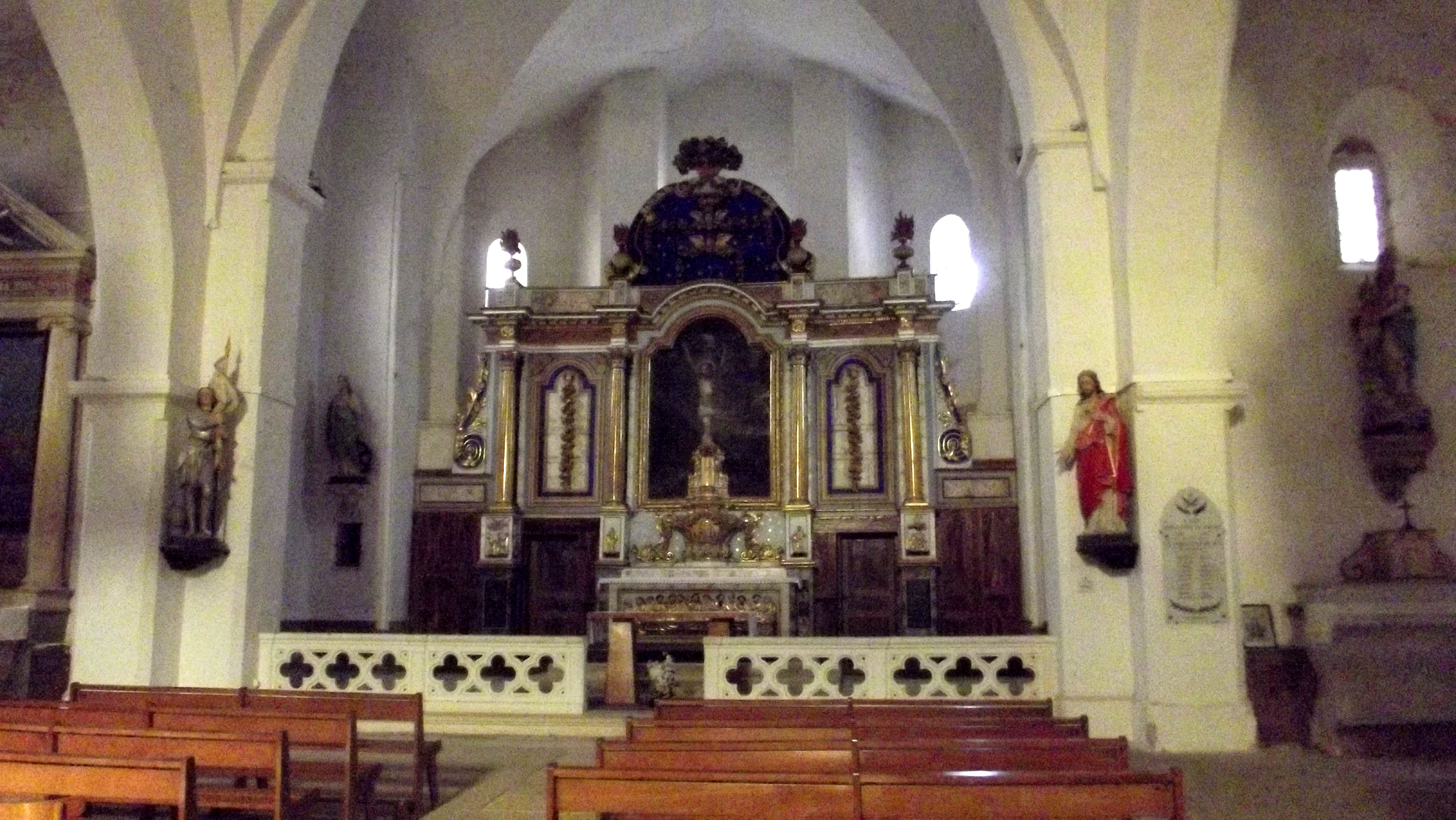 Église du XIVe restaurée au XVIIIe